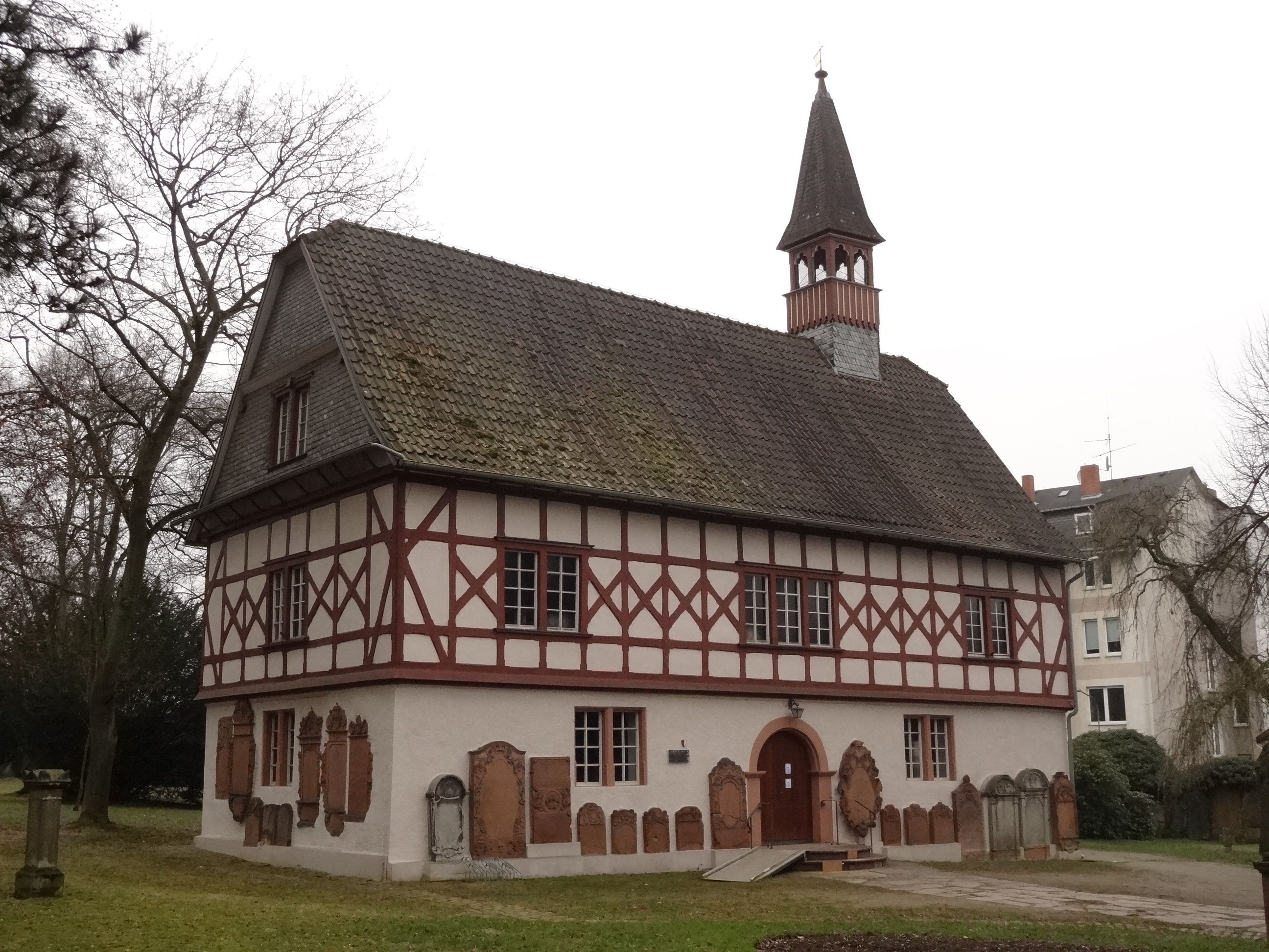 Alter Friedhof Gießen